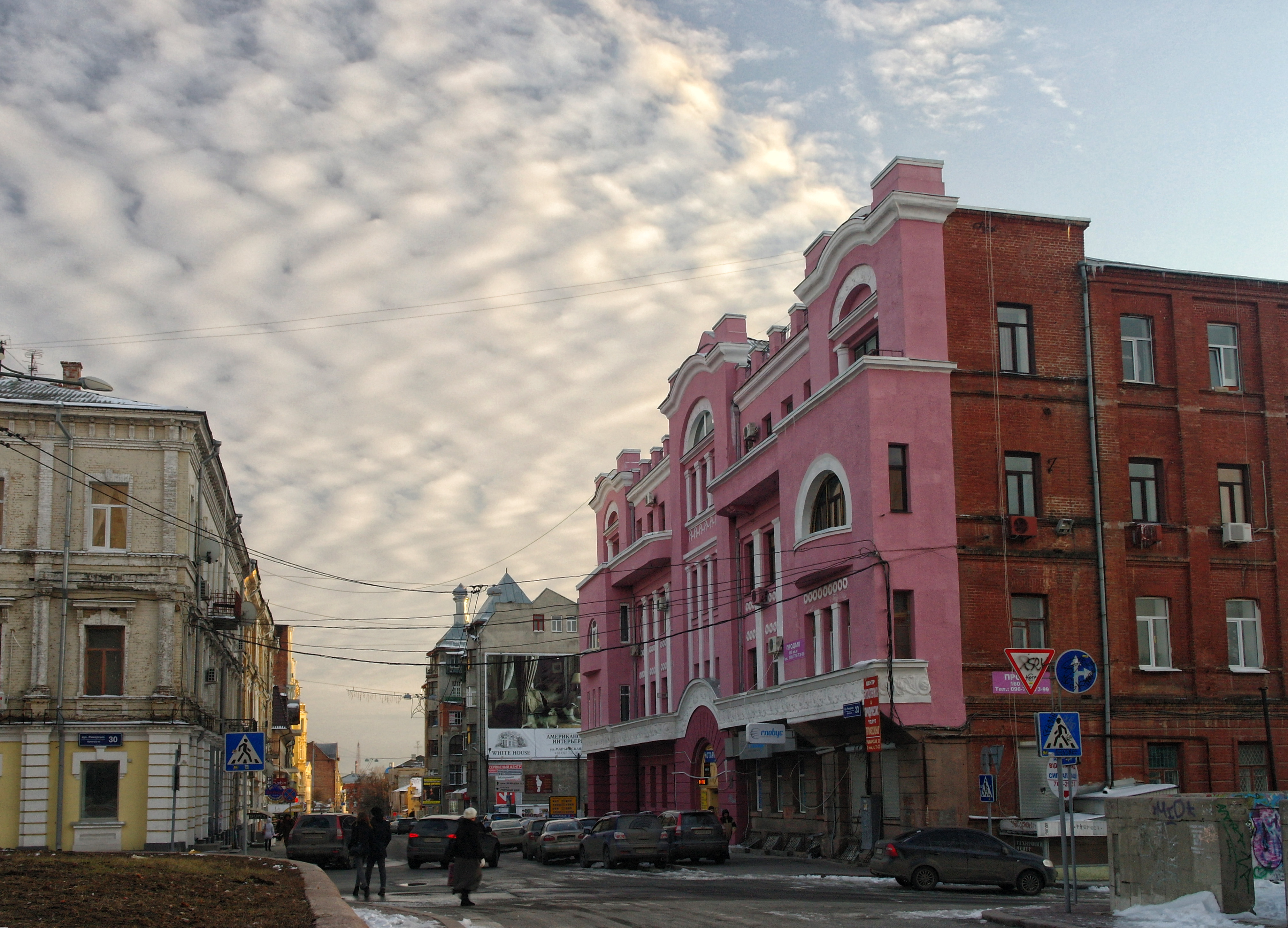 Харків, Римарська, 23